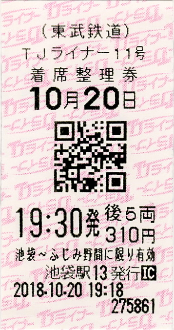 東武鉄道 TJライナー11号 着席整理券